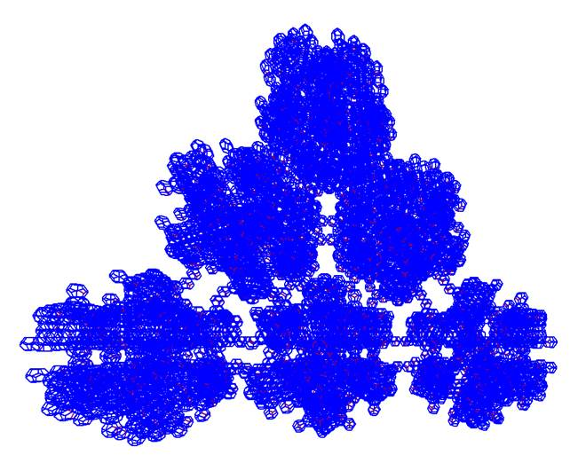 A középső ikozaéder egy lapja dodekaéderekkel építve